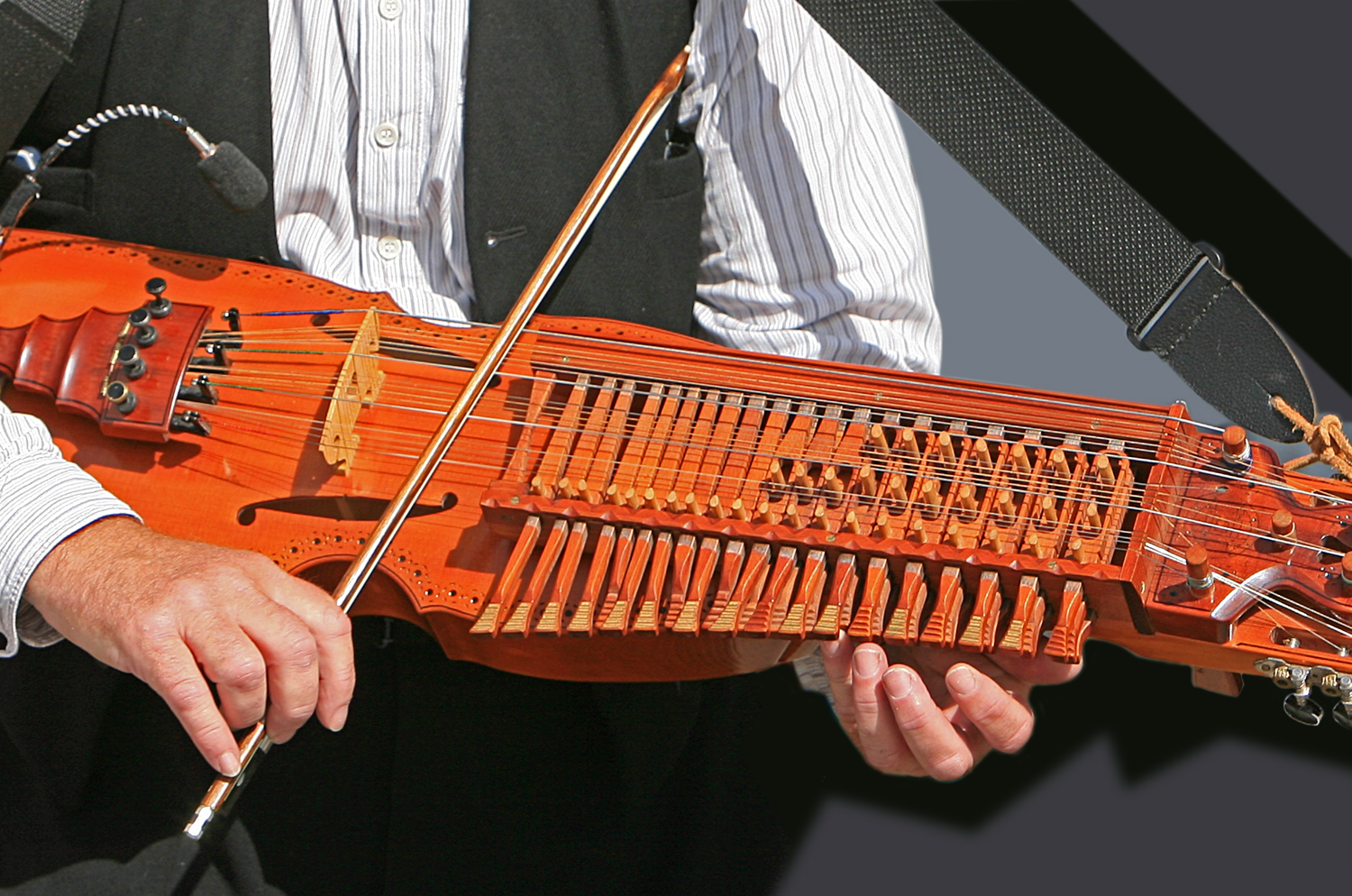 Snabba Ryck. Key Harp